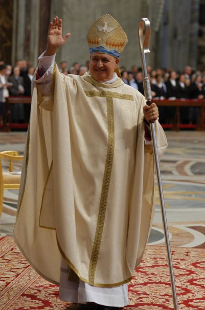 Vincenzo Di Mauro - Vescovo di Vigevano